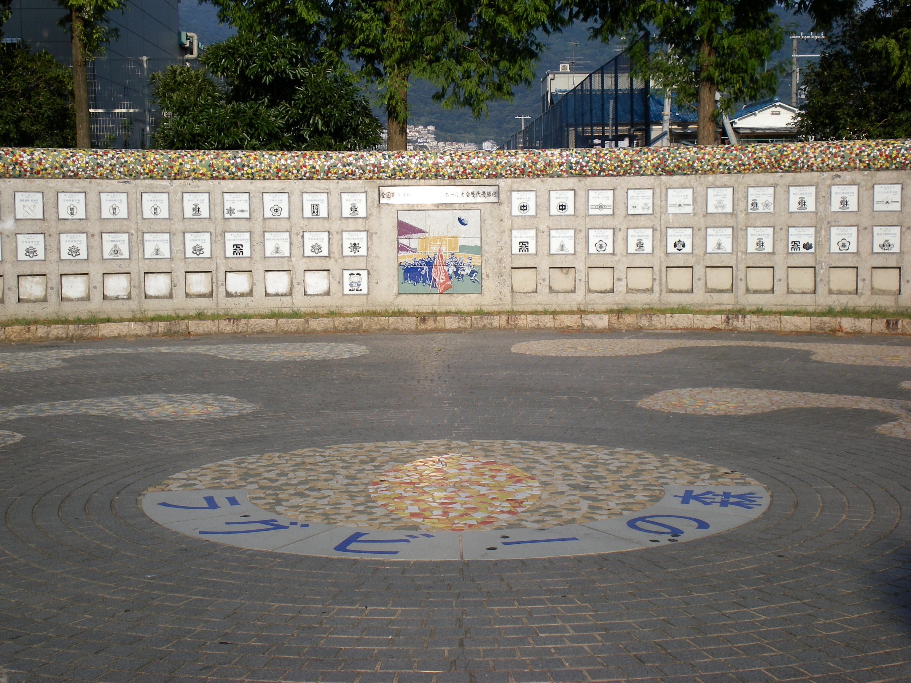 花園中央公園内、東大阪市花園ラグビー場第3グラウンド横にあるモニュメント。銘板には、全国高等学校ラグビーフットボール大会優勝校の名が刻まれている。